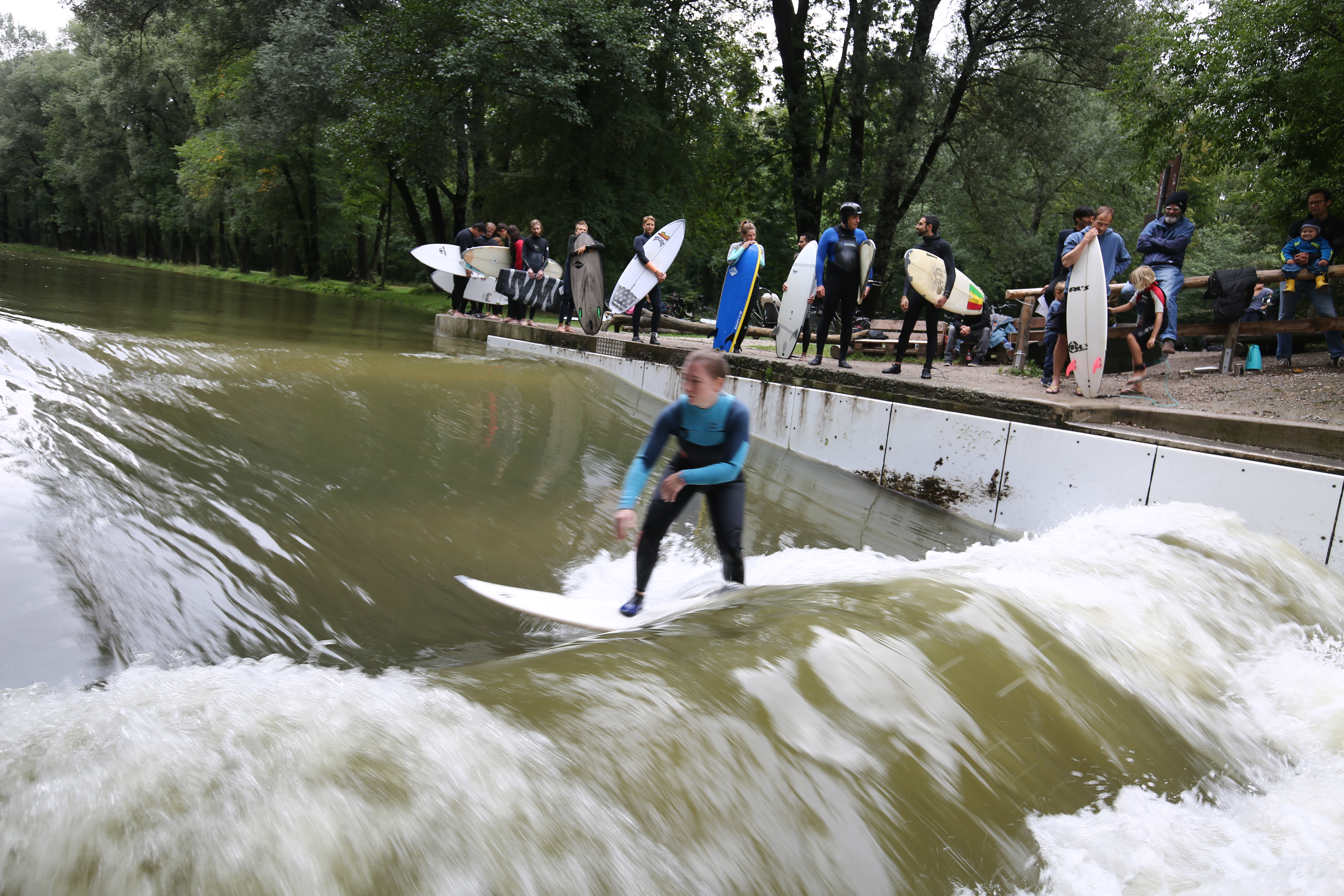 Surfen in München. Neben der bekannten Welle am Eisbach am Englischen Garten kann man auch im Münchner Süden an der Floßlände auf einer stehenden Welle surfen.